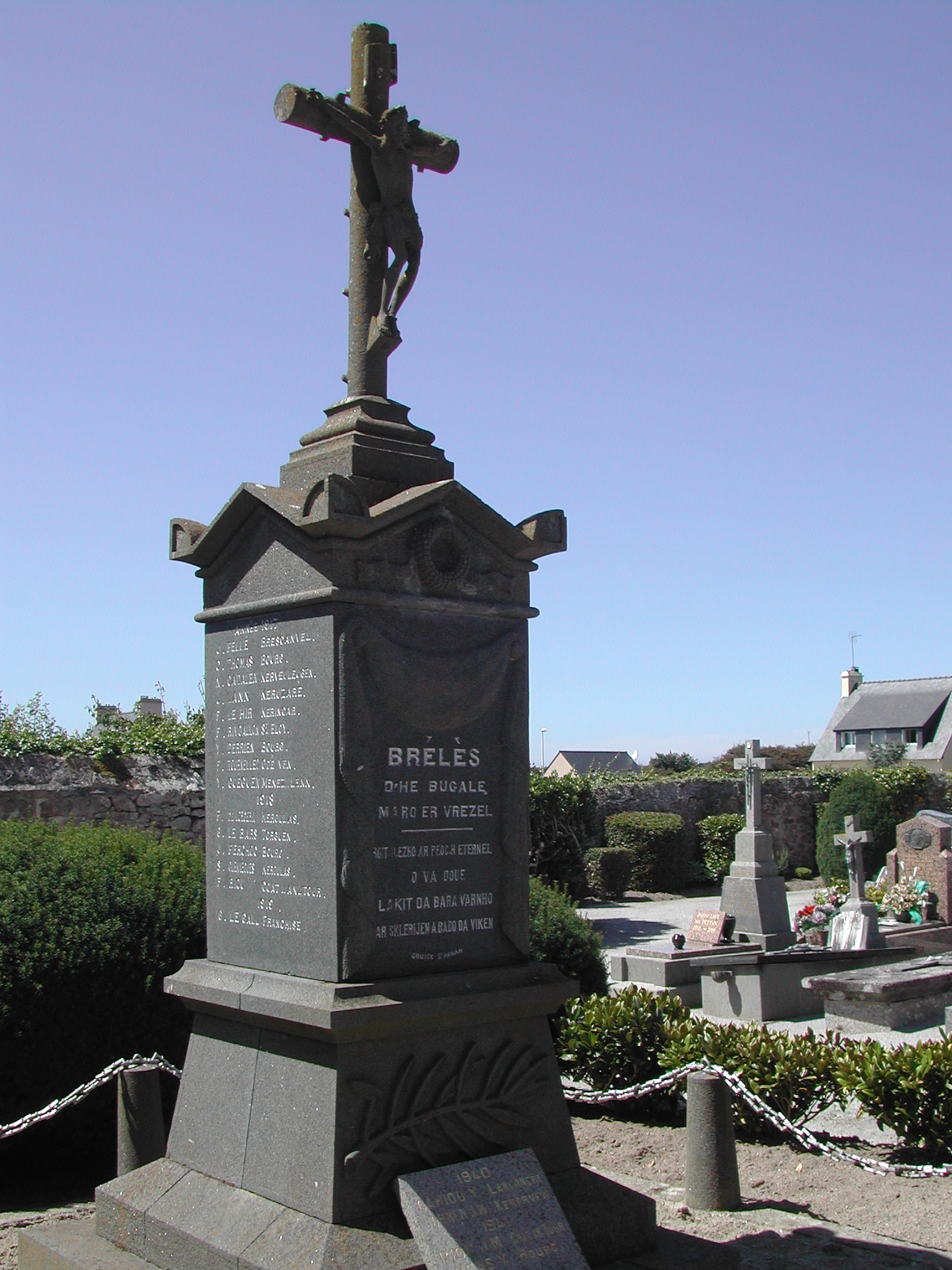 Monument aux morts - Brélès-29